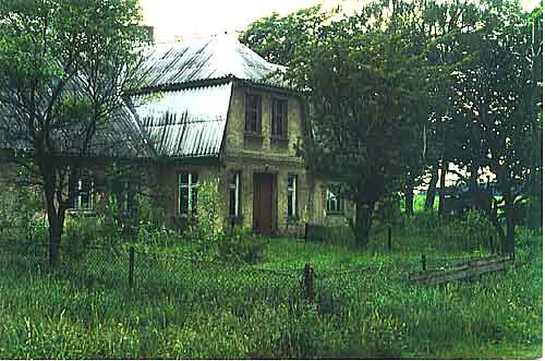 Modrolas